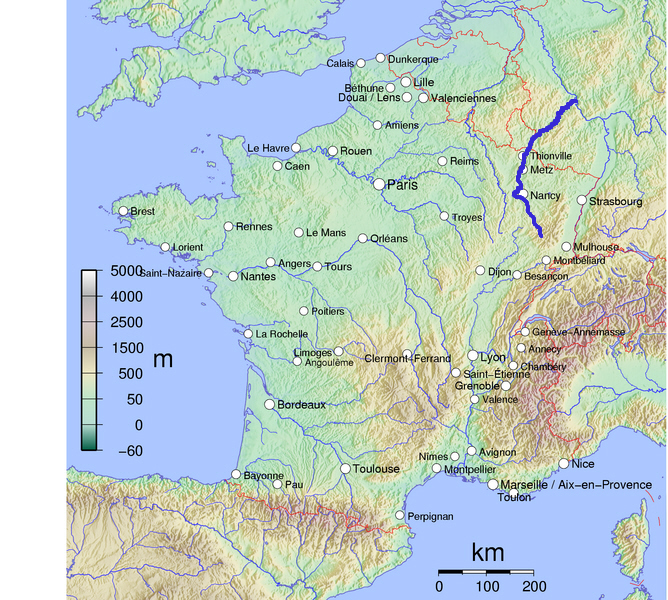 Kaart van Moezel op basis van Wikimedia Commons kaart van Frankrijk